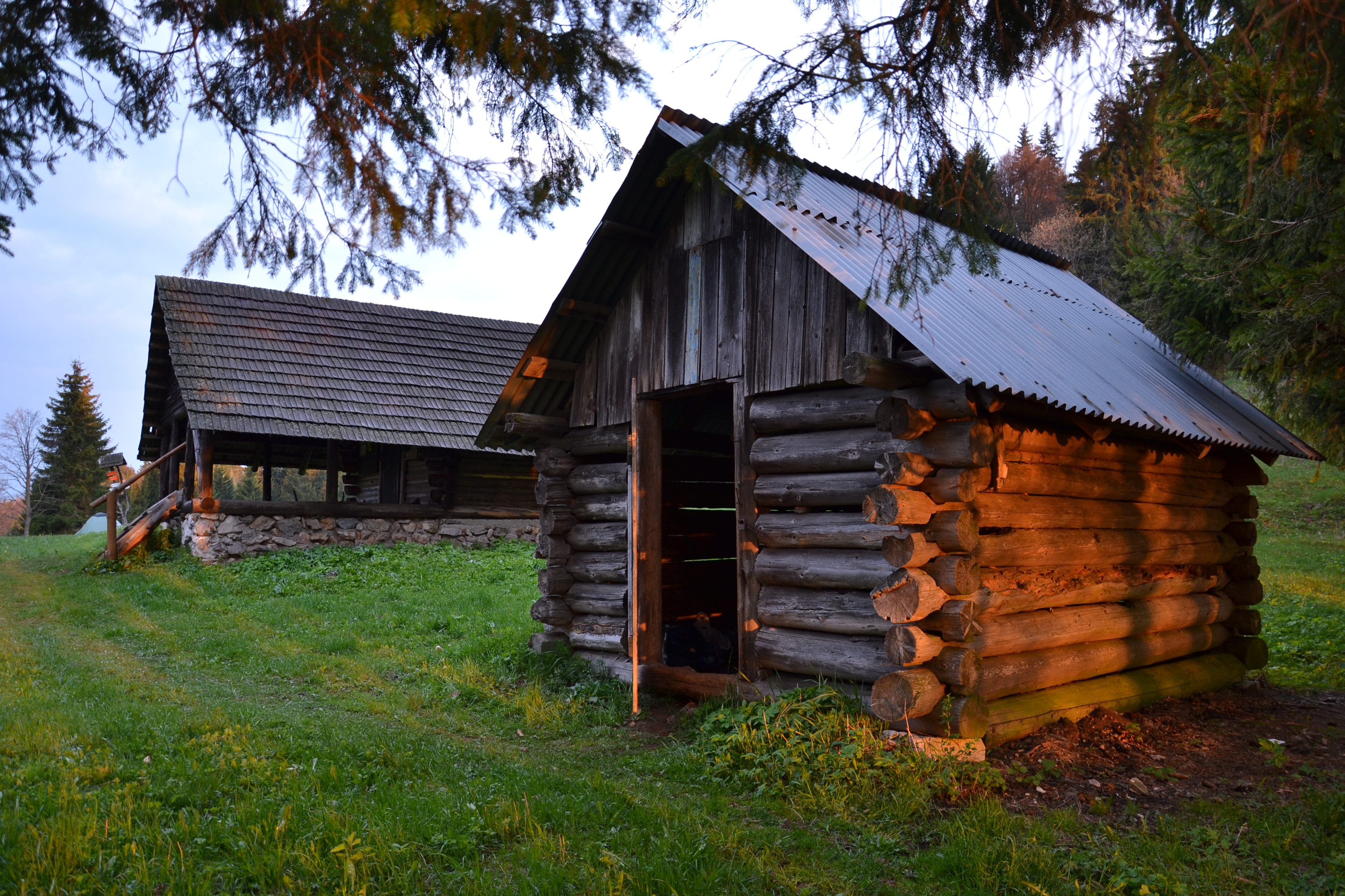 Muránska planina - Útulňa Nižná Kľaková